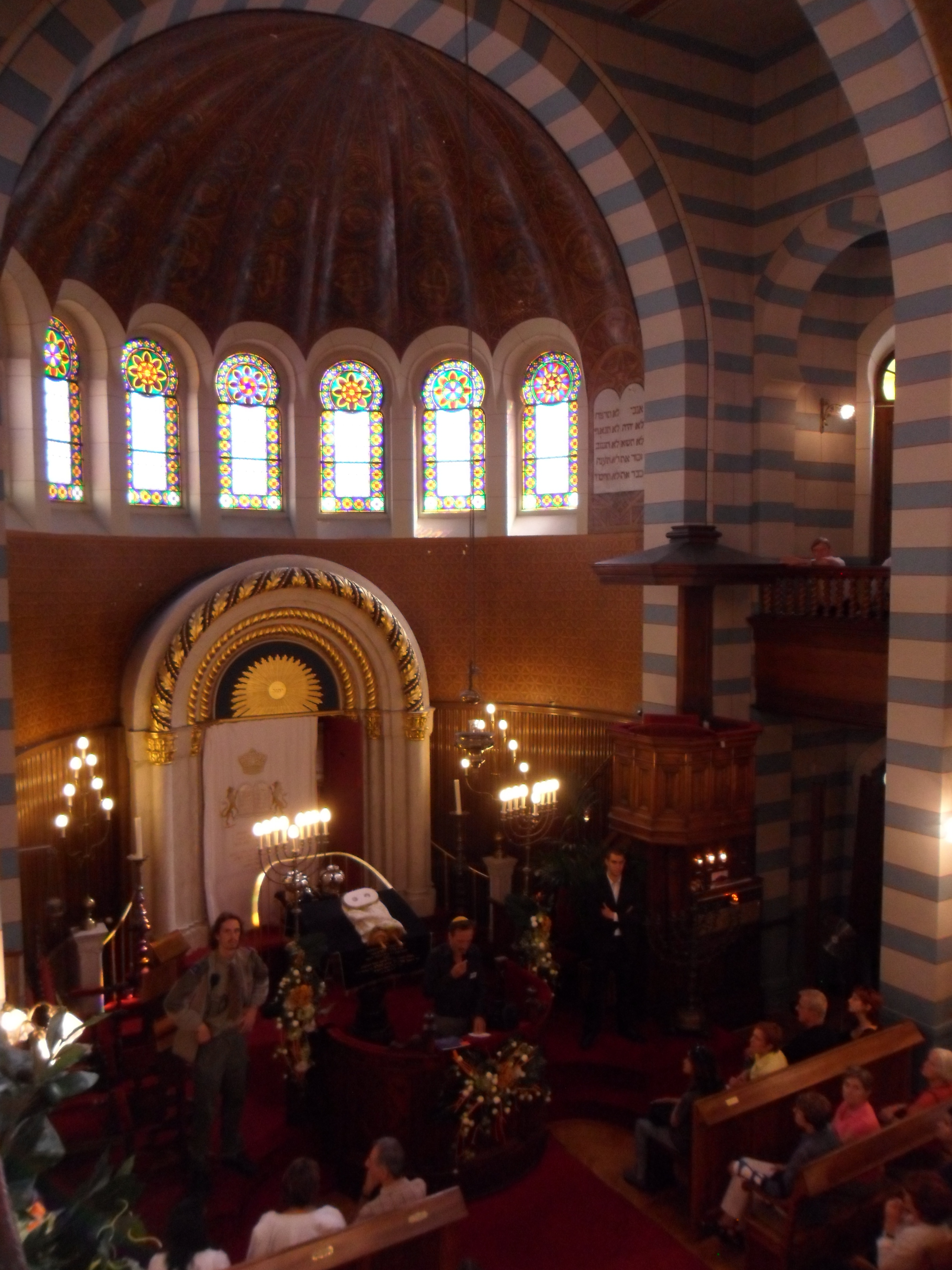 Intérieur de la synagogue Beth Yaacov vu depuis la terrasse nord